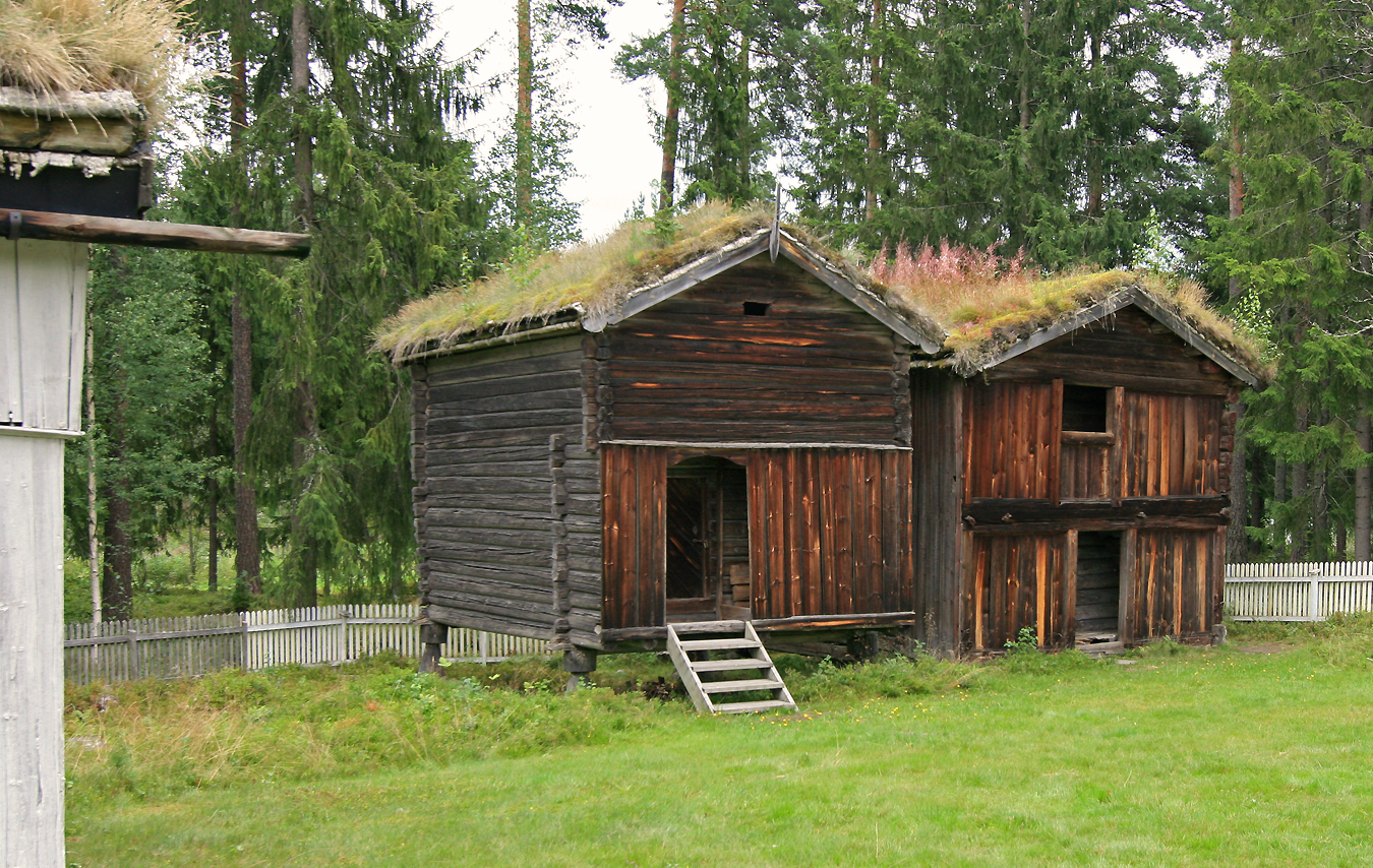 Stabbur fra Skjefstad, Elverum (til venstre) og loft fra Houm, Elverum (til høyre). I dag på Glomdalsmuseet.